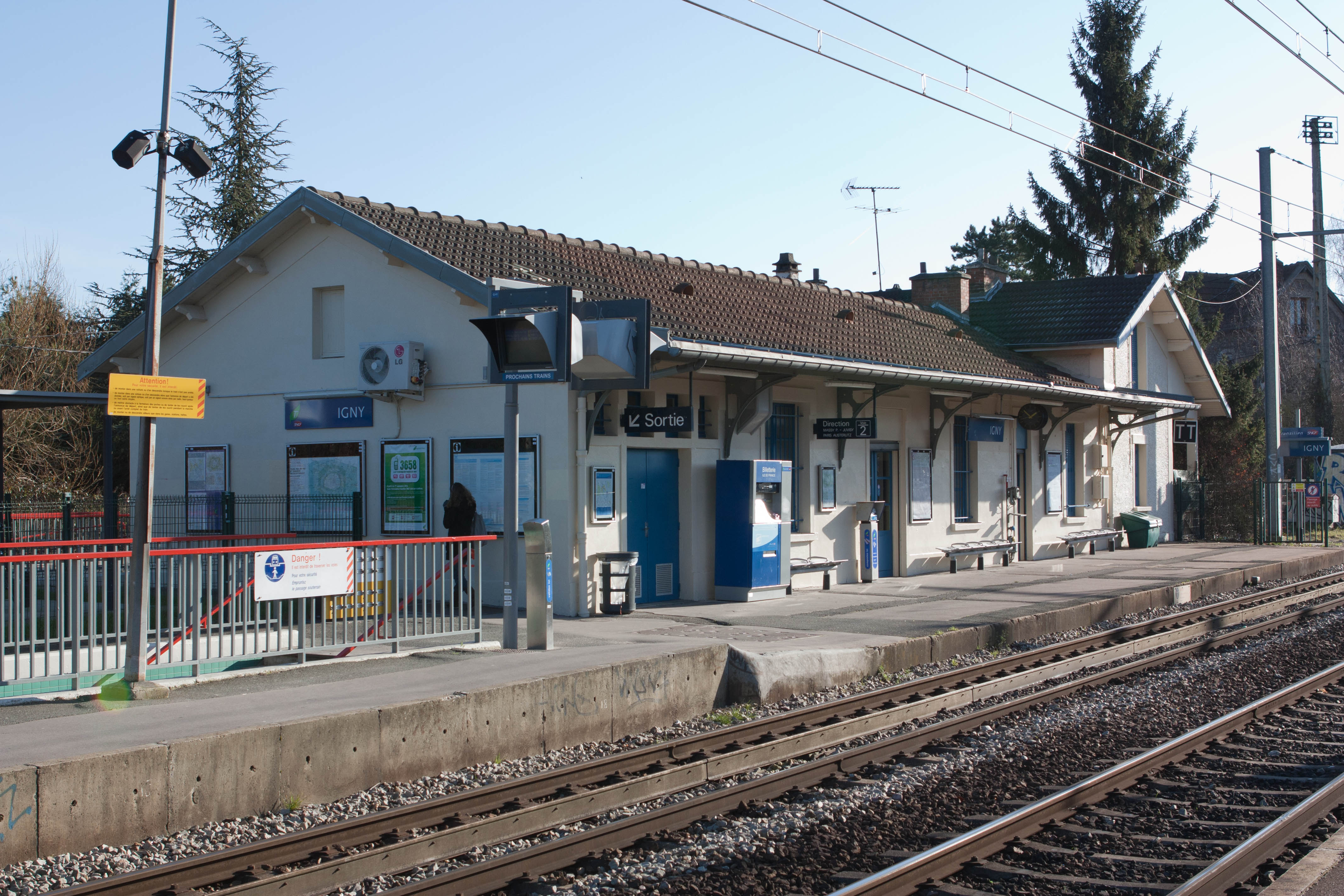 Gare d'Igny, Ligne C du RER, Igny, Essonne, France